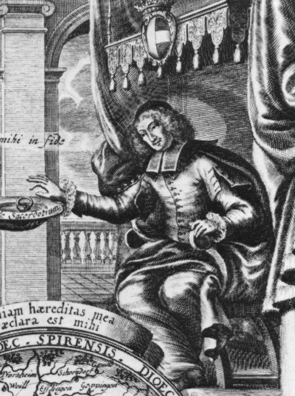 Bischof Marquard Rudolf von Rodt (Bischof 1689-1704) mit einer Karte des Bistums Konstanz. Kupferstich von Johann Ulrich Kraus nach Christoph Lienhardt. Rosgartenmuseum Konstanz. Detail: Bischof Marquard Rudolf von Rodt.